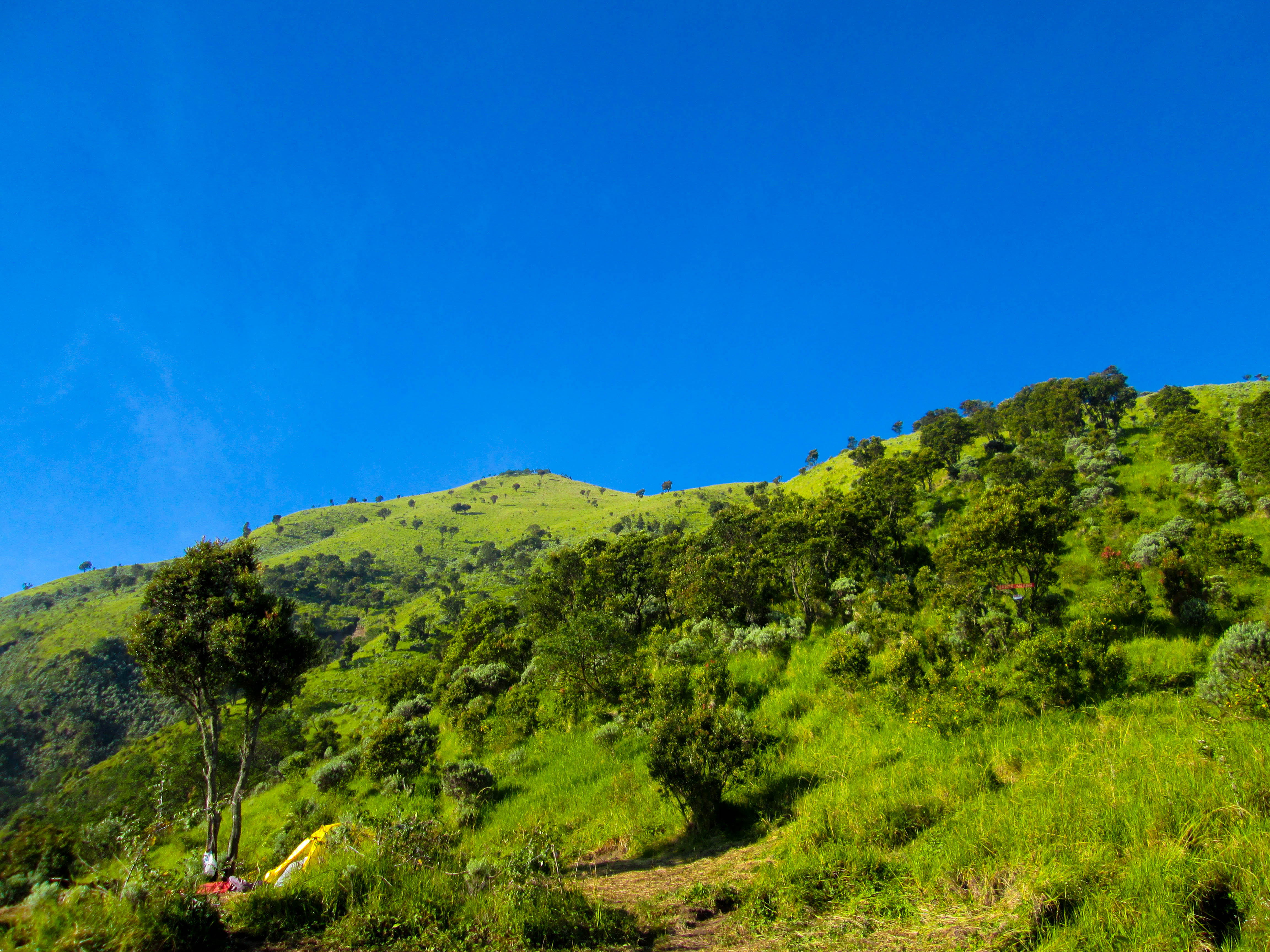 Lanskap sisi barat daya Taman Nasional Gunung Merbabu. Gunung Merbabu terkenal dengan keindahan padang rumputnya yang sering disebut dengan 'sabana'. namun seiring dengan meningkatnya pengunjung, keindahan sabana ini juga terancam untuk rusak.